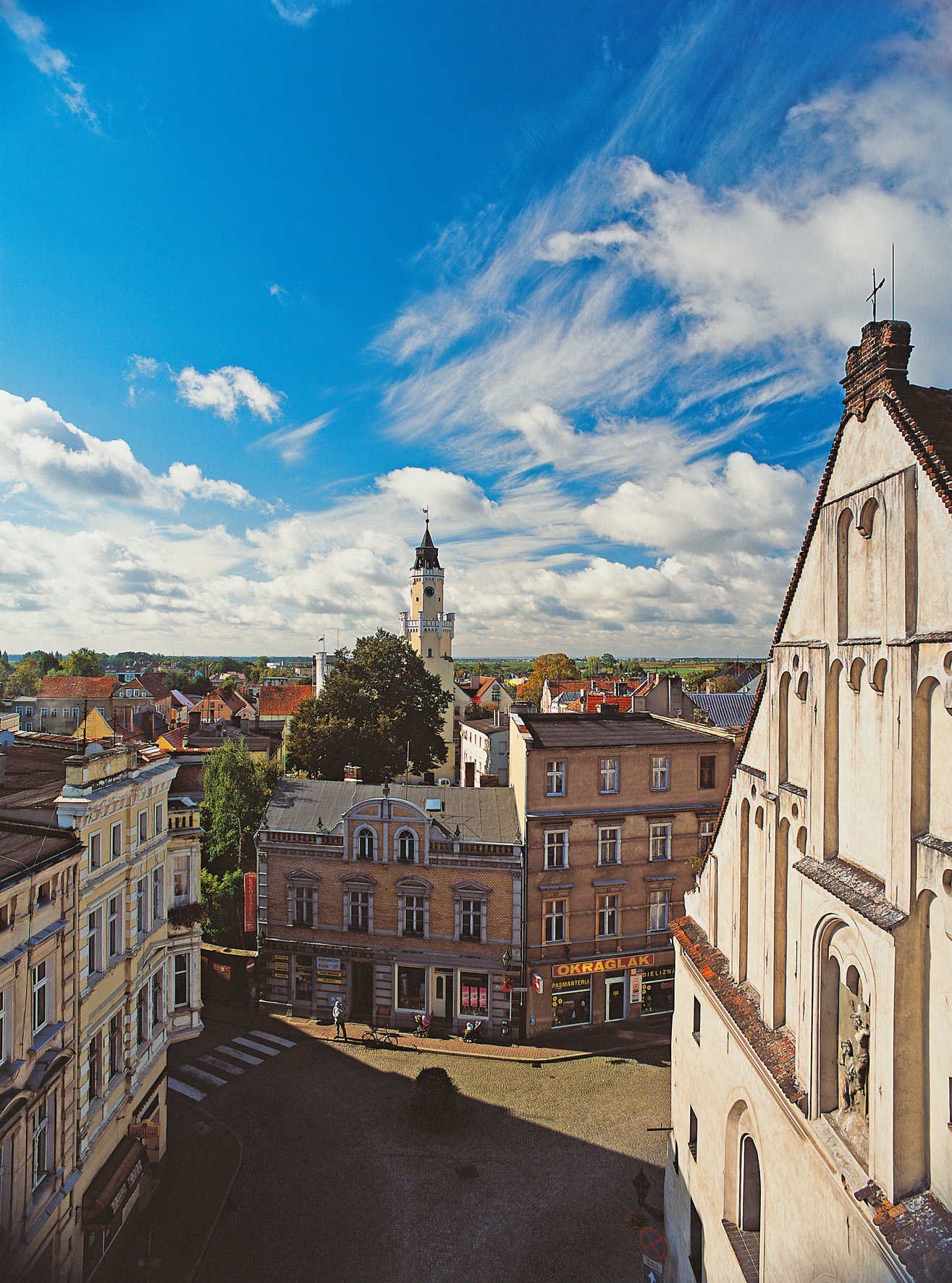 Ratusz miejski we Wschowie